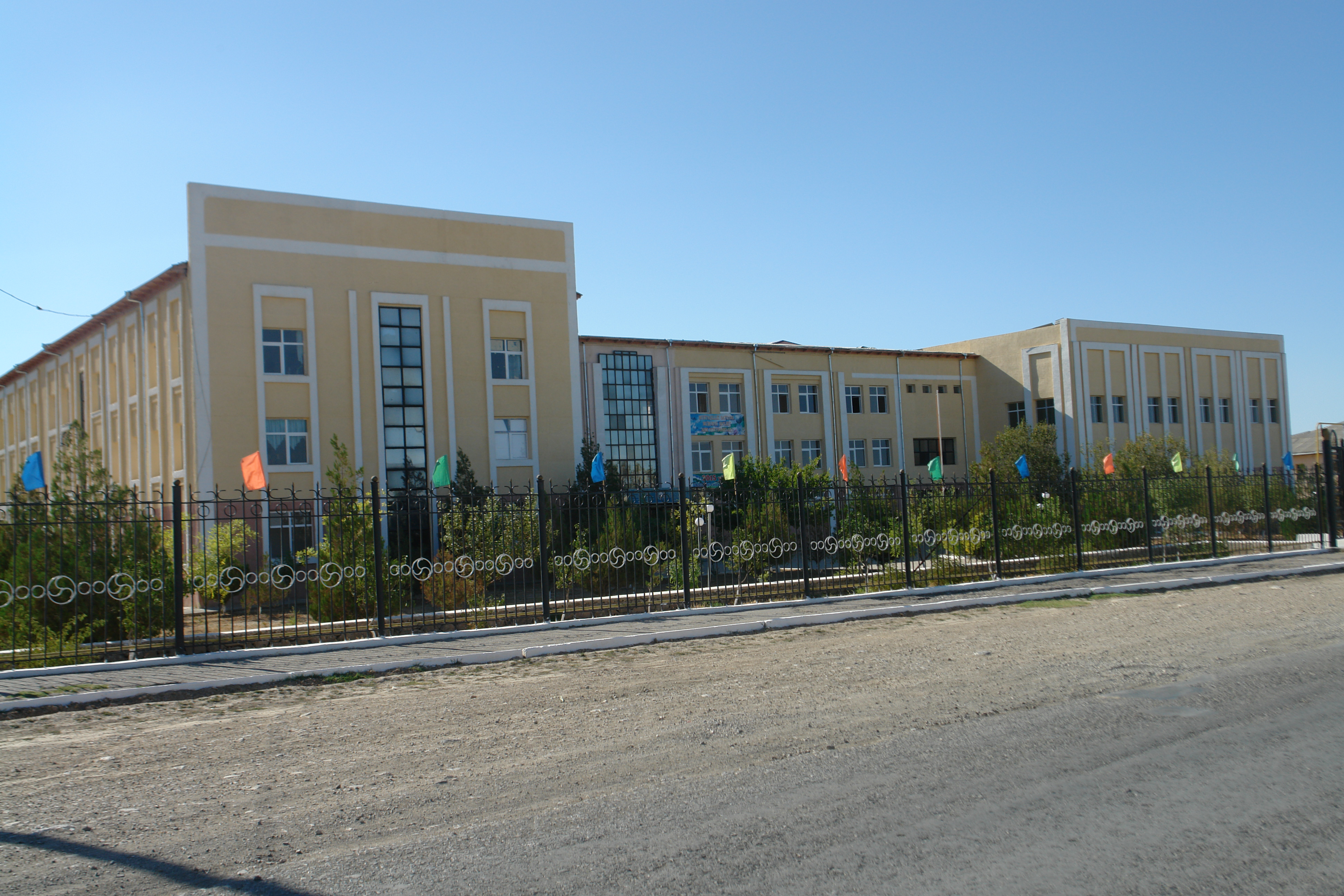 Колледж в Новом Кишлаке, Фарижская область, Узбекистан